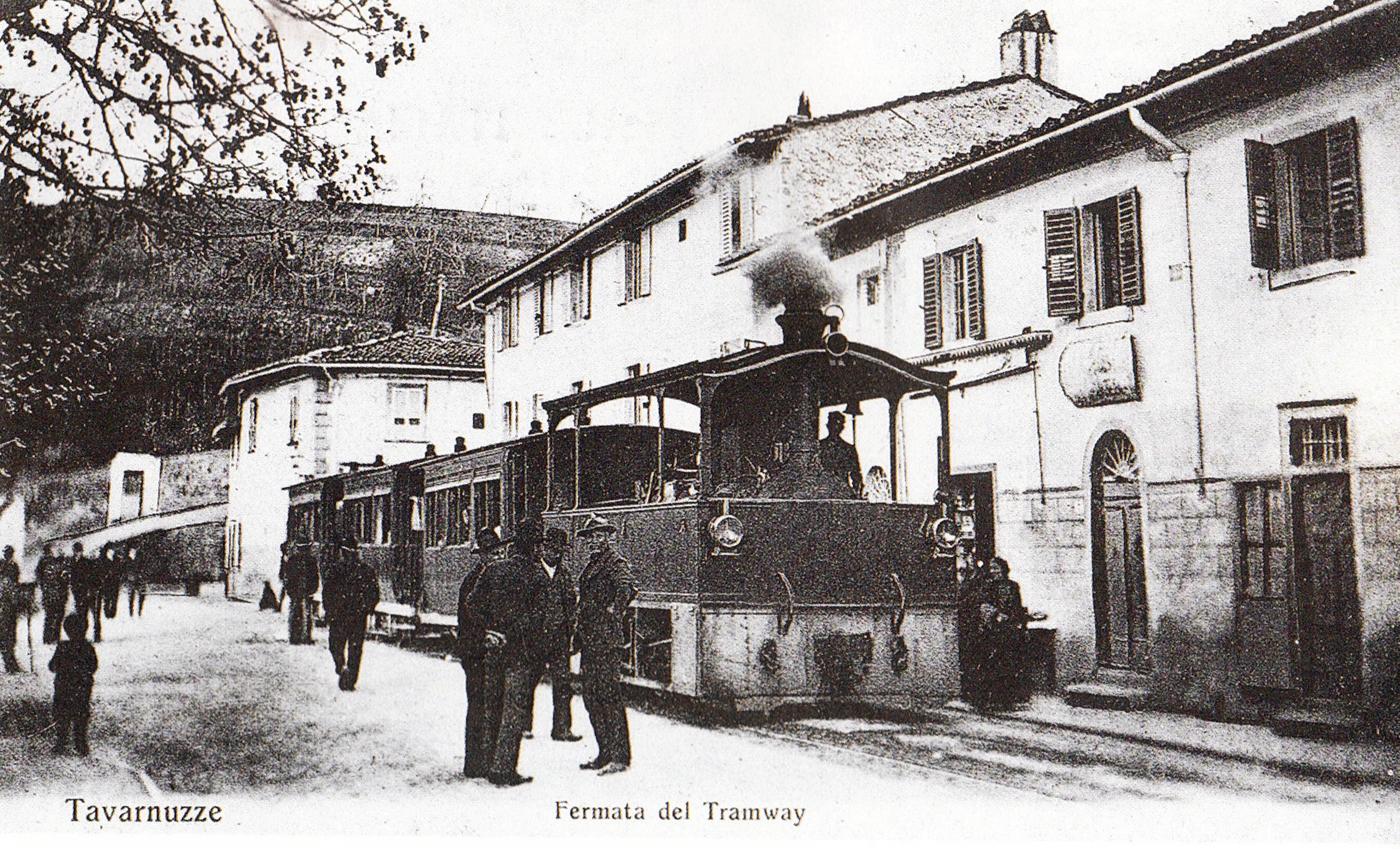 Fermata di Impruneta della tranvia del Chianti